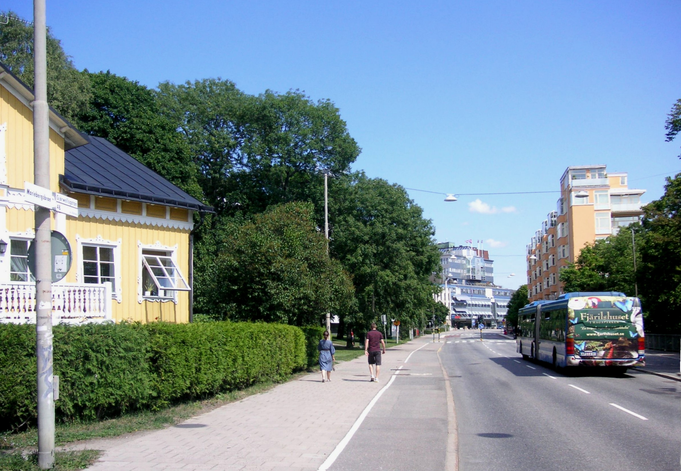 Gjörwellsgatan i Stockholm, sedd mot nordost